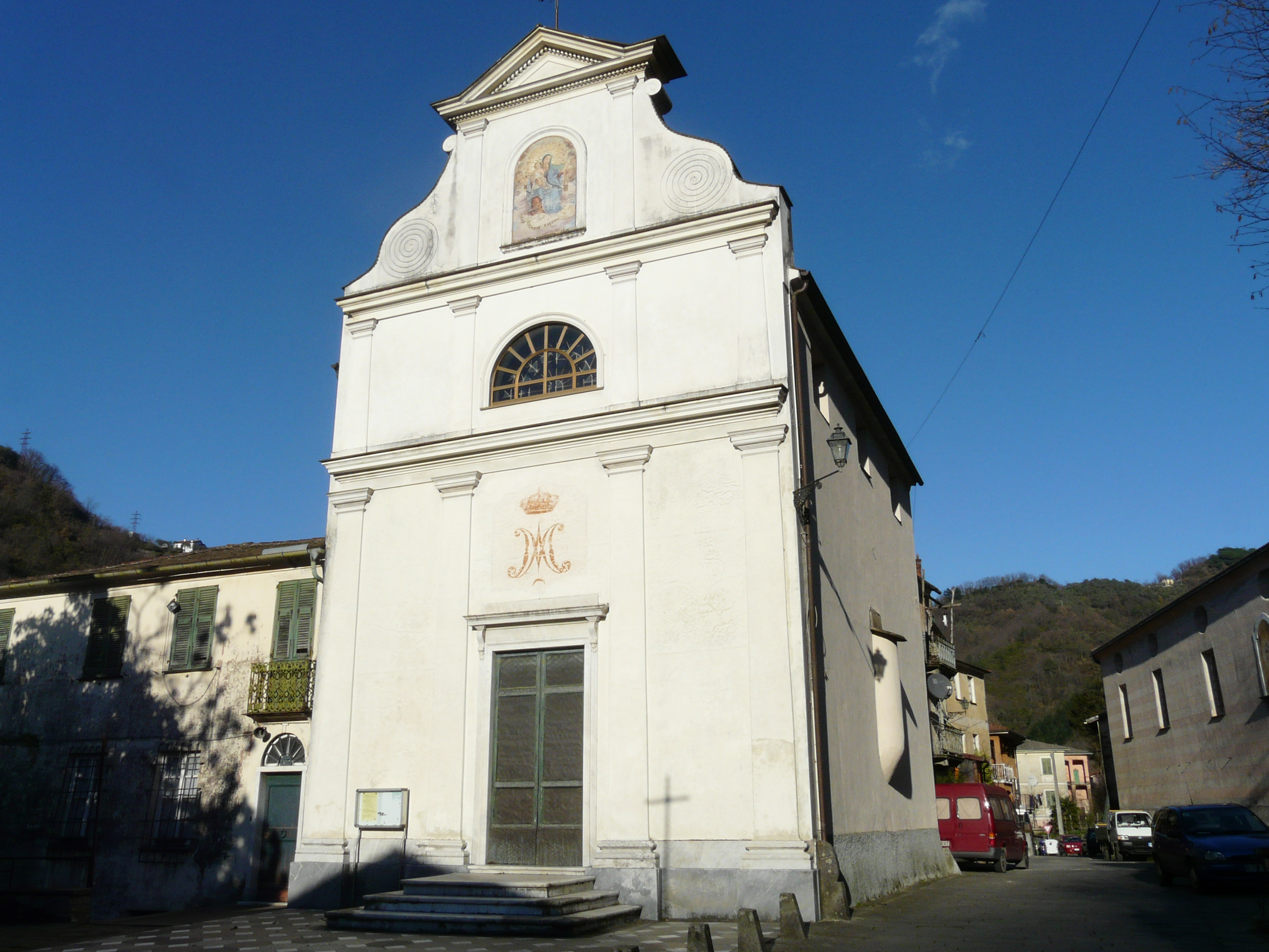 Chiesa di Nostra Signora del Carmine, Comune di Mezzanego, Liguria, Italia